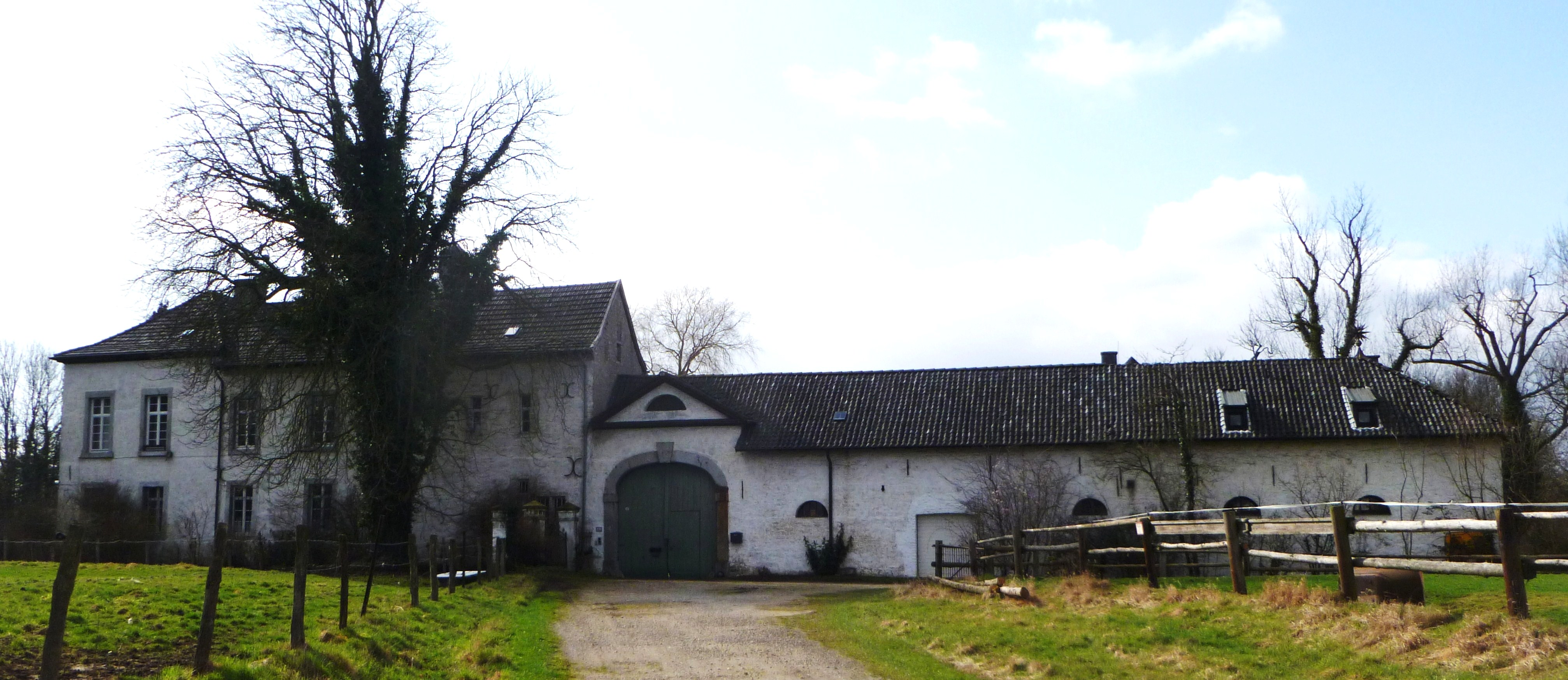 Baudenkmal in Aachen-Laurensberg - ehemaliges vierflügelisches Rittergut Berger Hochkirchen, zeitweise Eigentümer Cornelius von Guaita, Oberbürgermeiter der Stadt Aachen, Nadelfabrikant